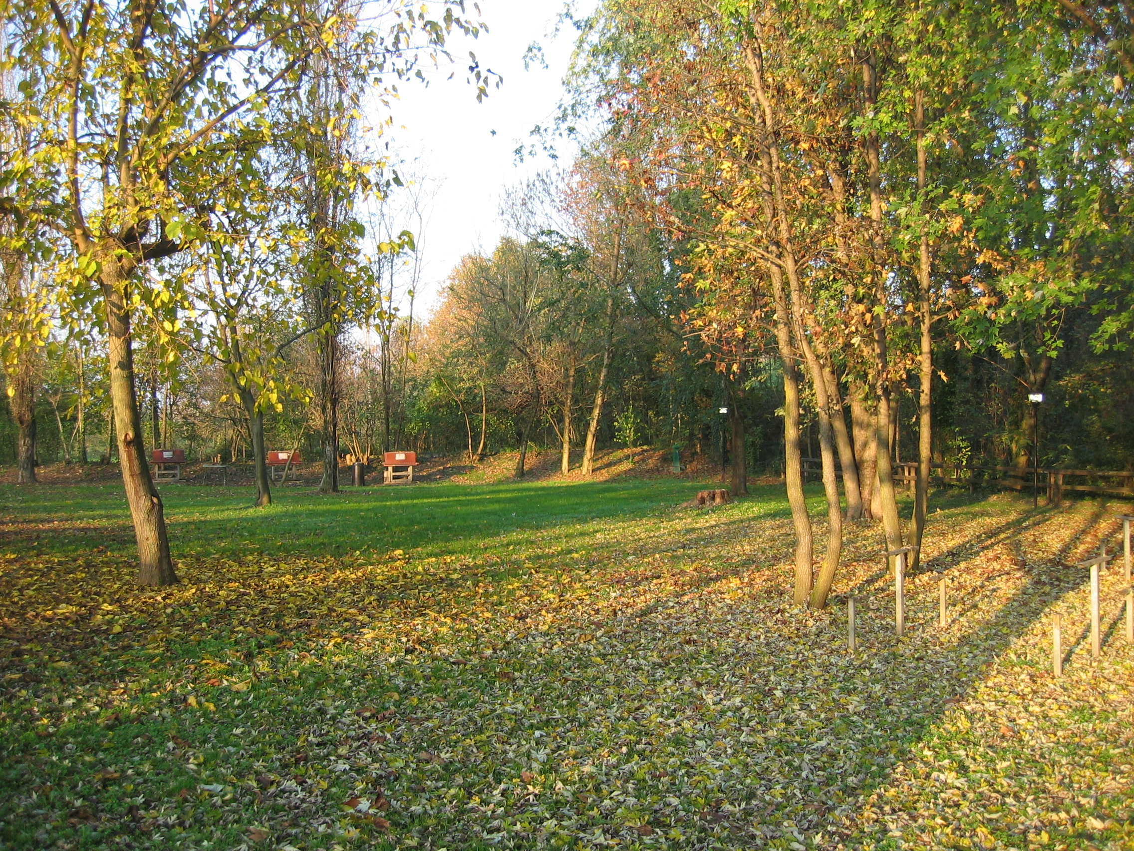 Il parco del Roccolo (Treviglio).